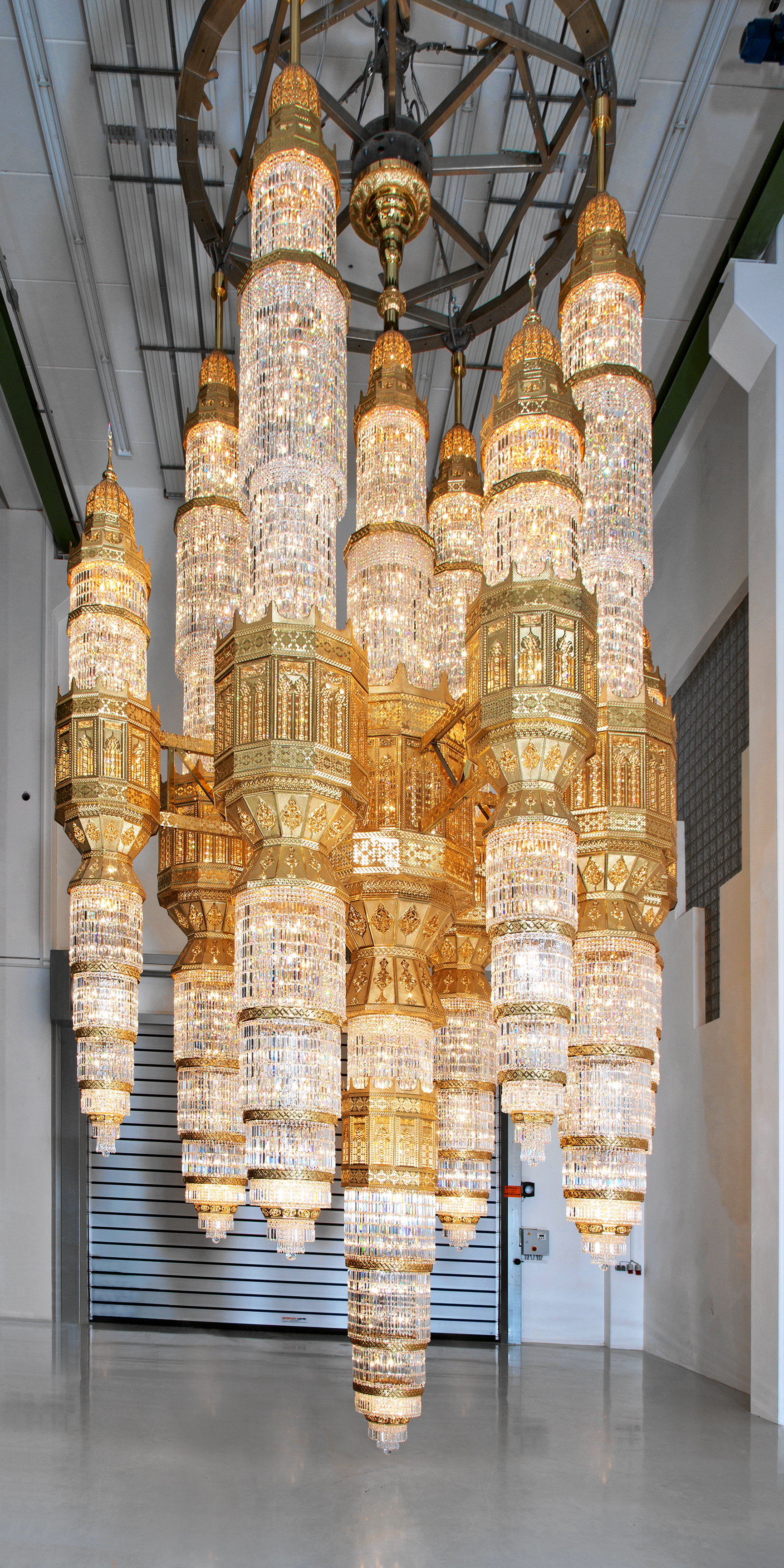 Kurz vor der Auslieferung, in der Produktionshalle von Kny Design in Ramingdorf (Niederösterreich): Einer der größten je hergestellten Luster der Welt, die von Kny Design geplante und hergestellte Leuchte für die Al Ameen-Moschee in Muscat (Oman).